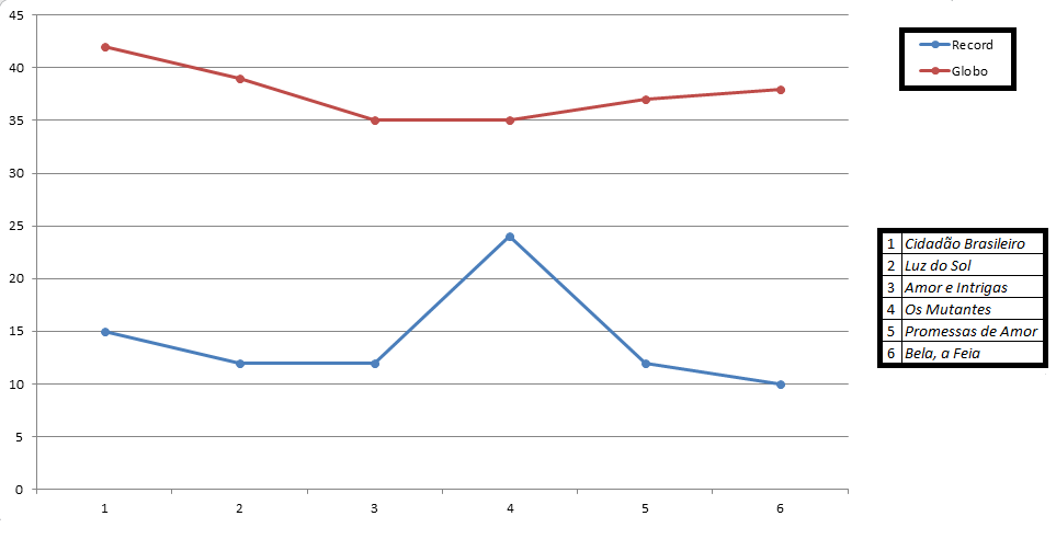 Gráfico demonstrando a audiência obtida, na estreia, pelas seis "novelas das oito" exibidas pela Rede Record entre 2006 e 2009, e, em comparação, a audiência obtida pela Rede Globo no mesmo dia